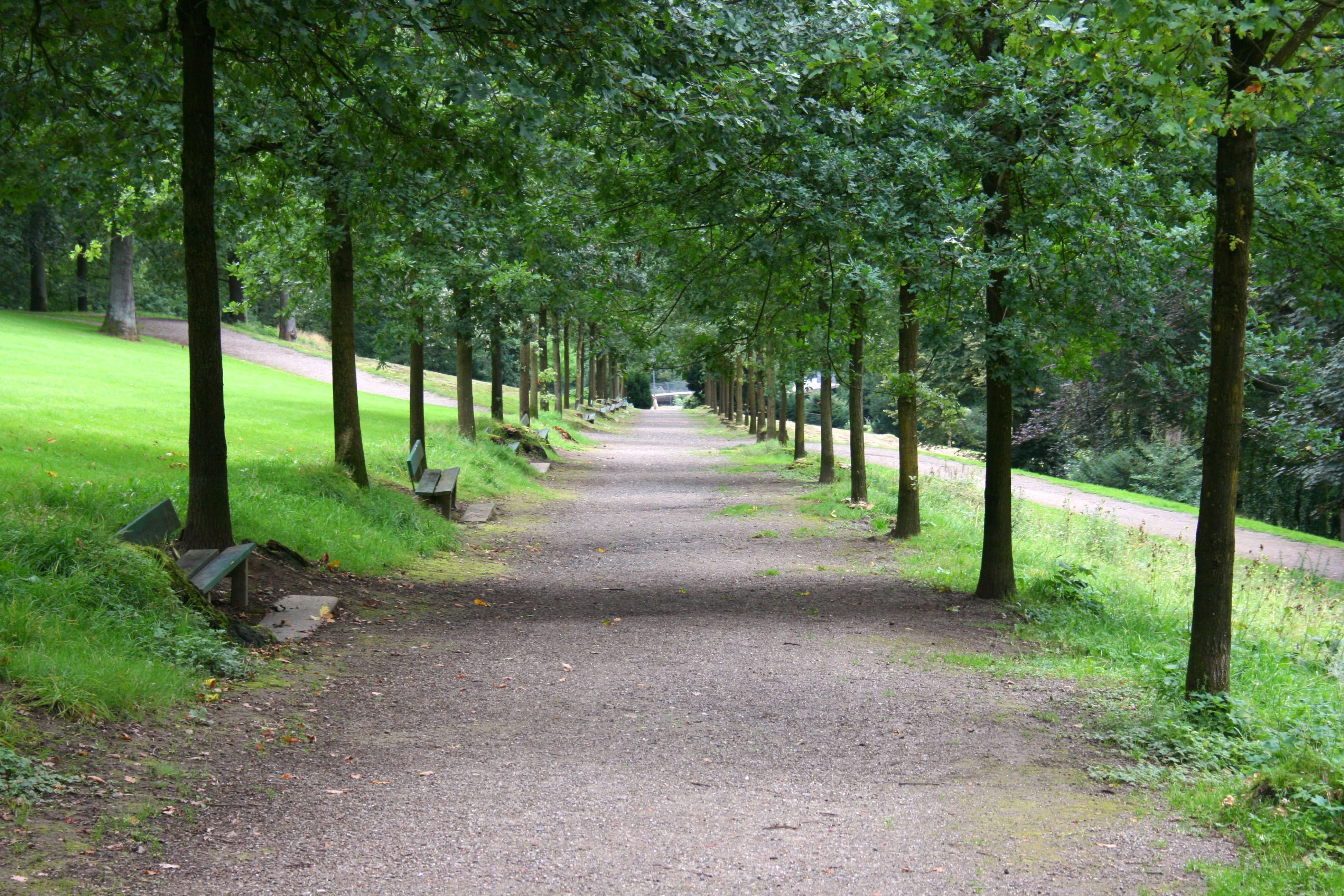 Barmer Anlagen in Wuppertal-Barmen